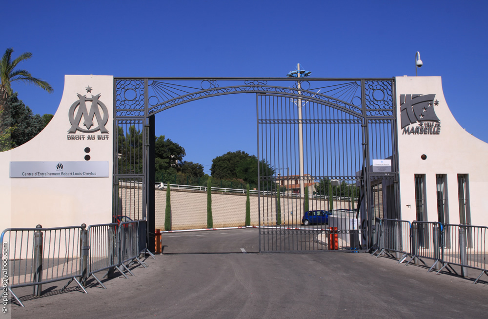 l'entrée du centre d'entraînement Robert-Louis Dreyfus, de l'Olympique de Marseille. Architect:Christophe MEYSSONNIER